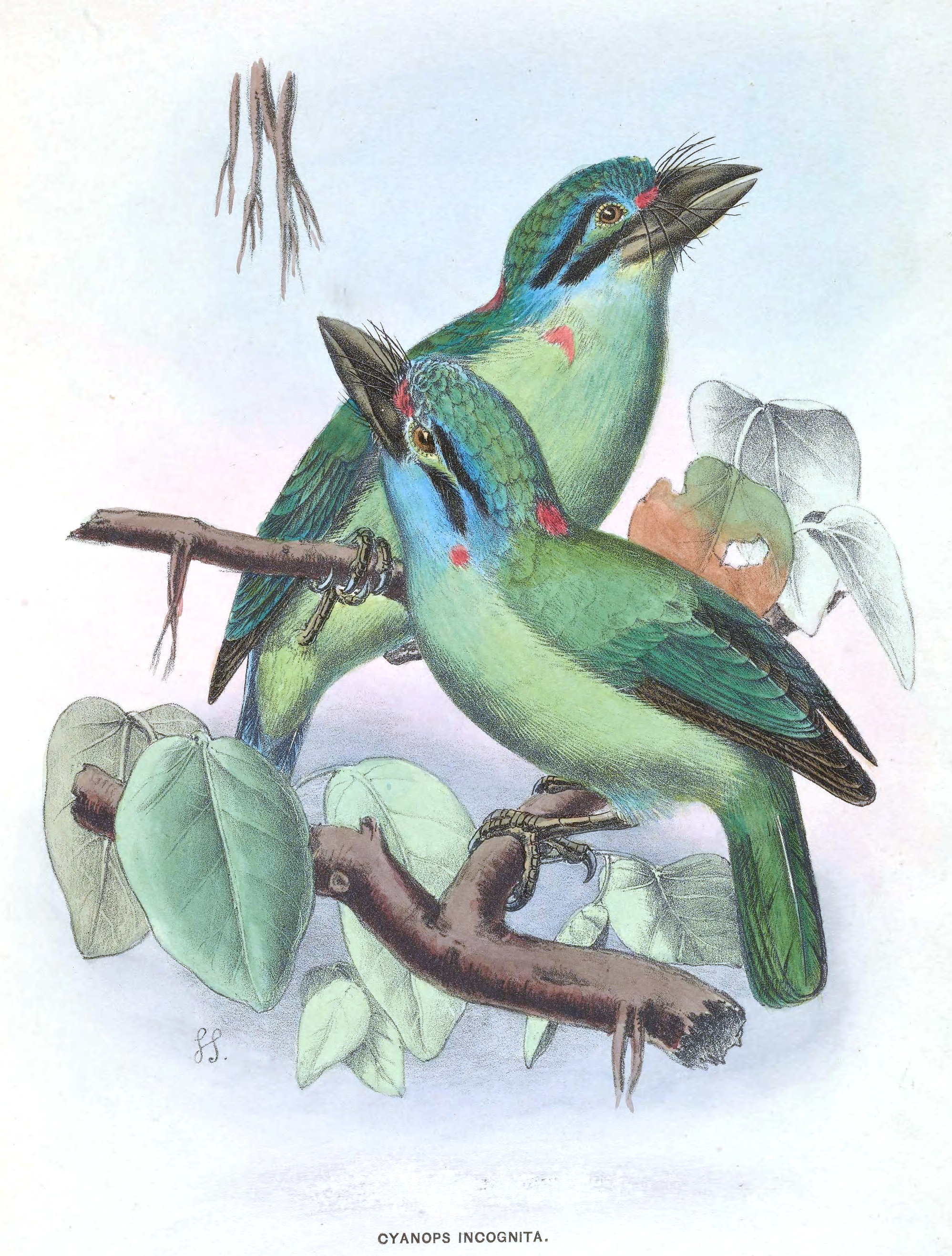 Megalaima incognita